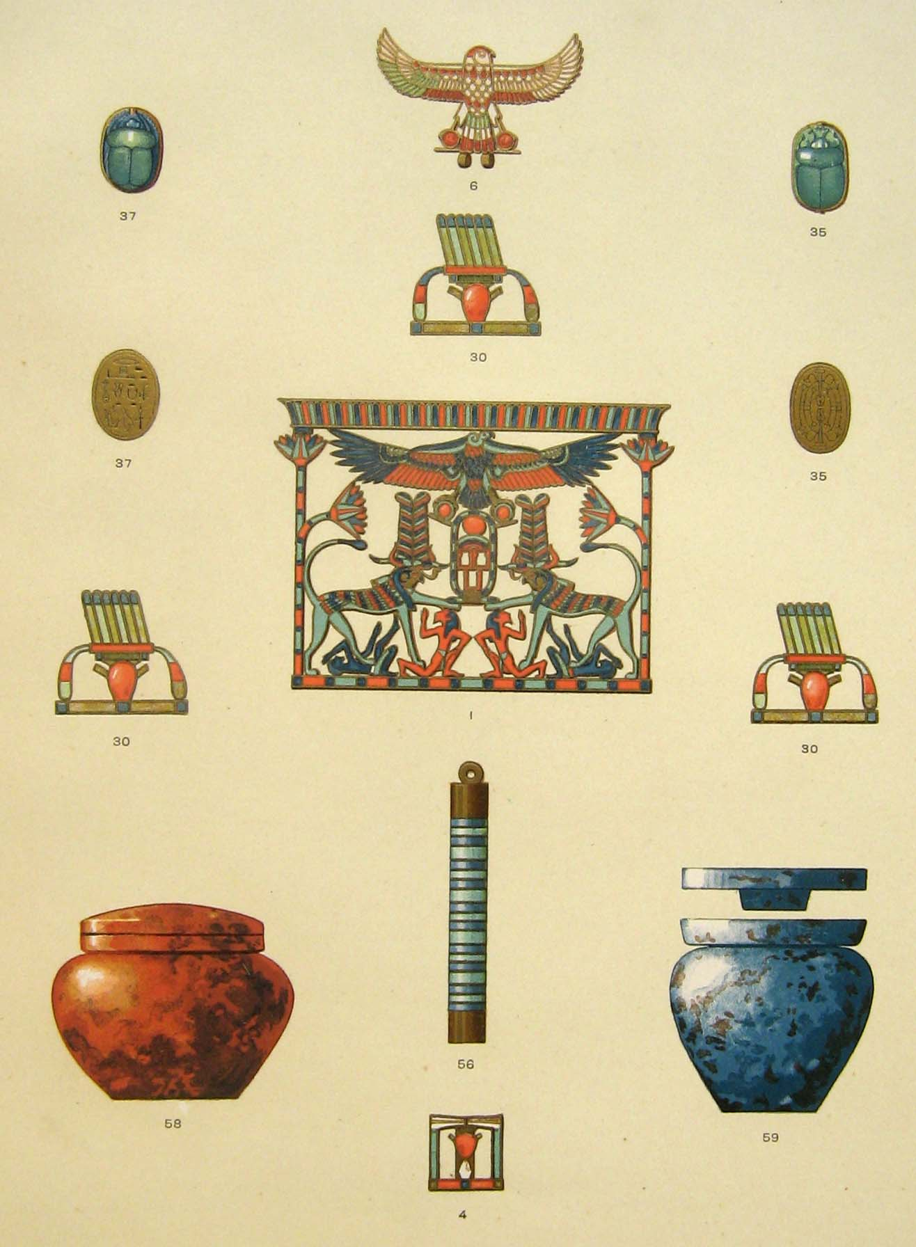 bijoux du trésor du complexe de Sésostris III à Dahchour. Au centre (n°1) pectoral de la princesse Méreret au nom de son père Sésostris III (Ousertesen III, selon Morgan)